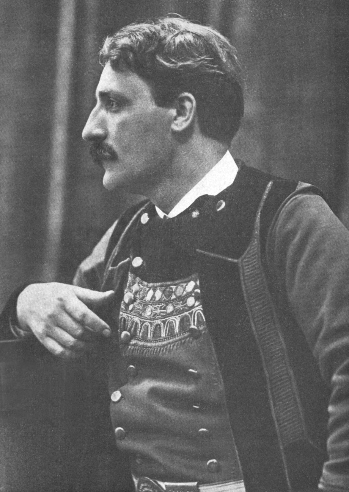 Portrait de Théodore Botrel.